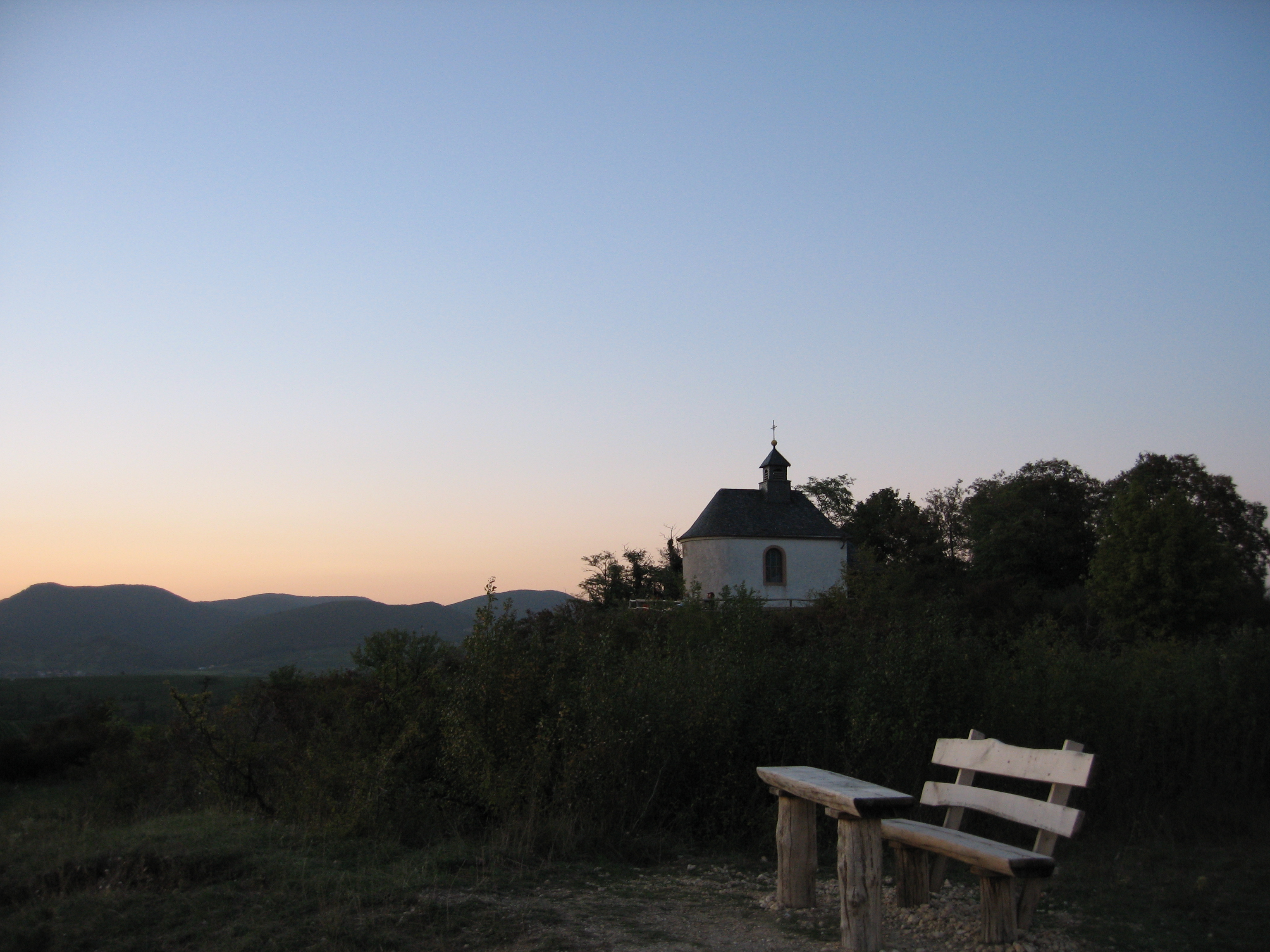 Aussichtspunkt und Kapelle auf dem Gipfel der „Kleinen Kalmit“